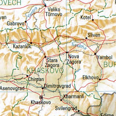 Stara Sagora - Lage der Stadt in Bulgarien